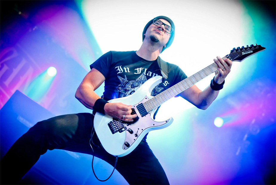 Steven 'gaze' Sanders live at Pukkelpop 2013